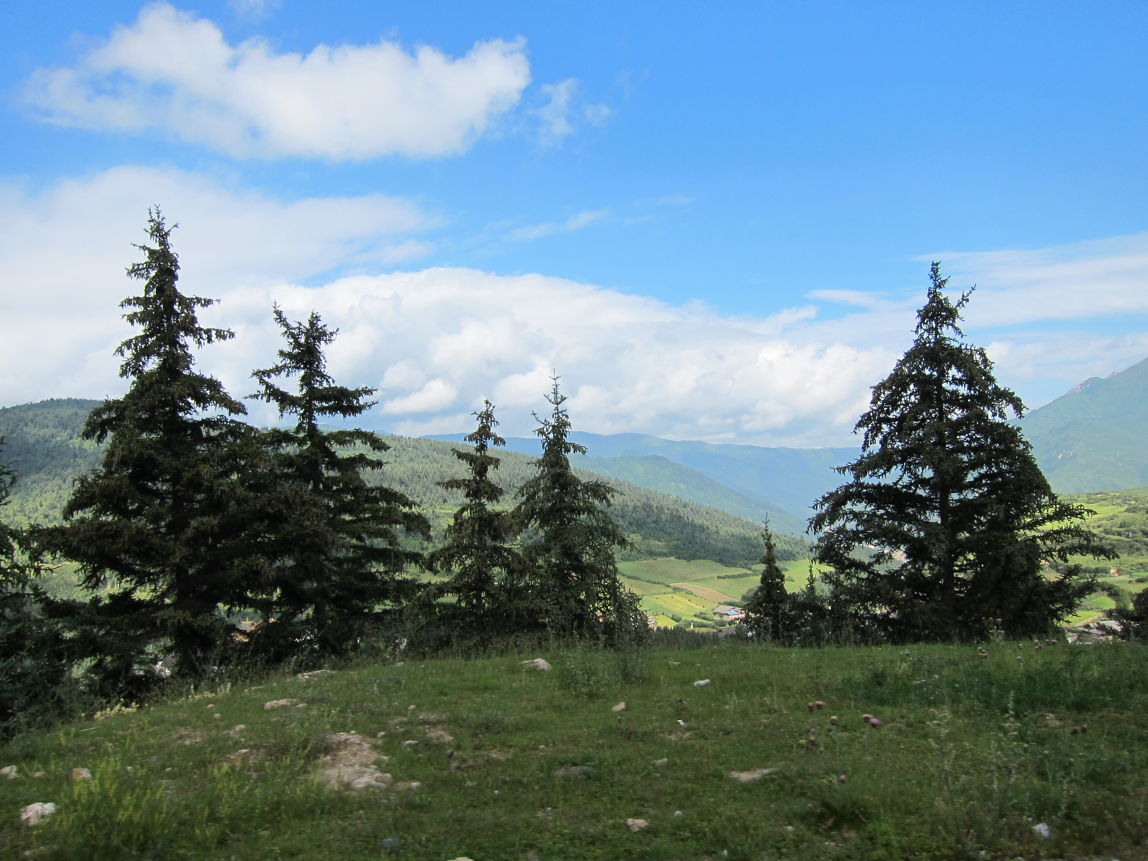 Picea asperata, Aba Zangzu Qiangzu, Sichuan